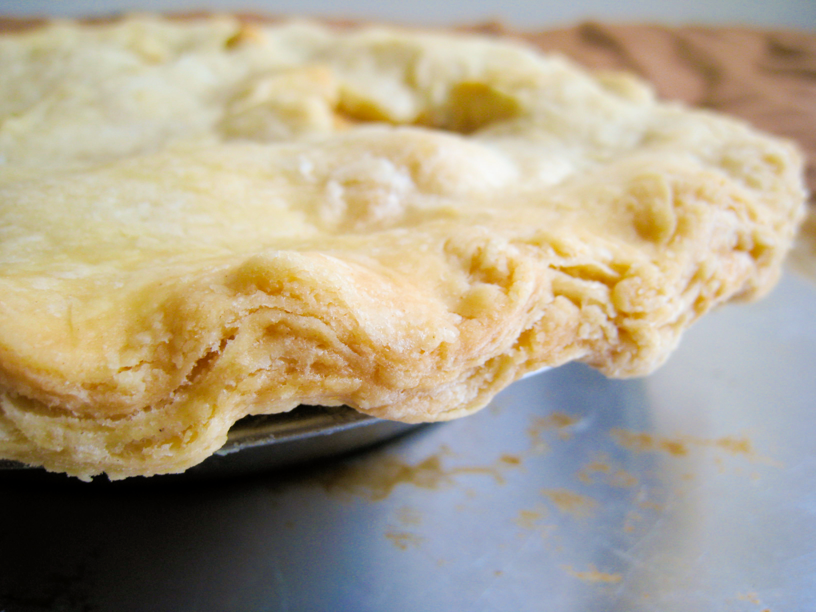 Flaky Vegan Pie Crust